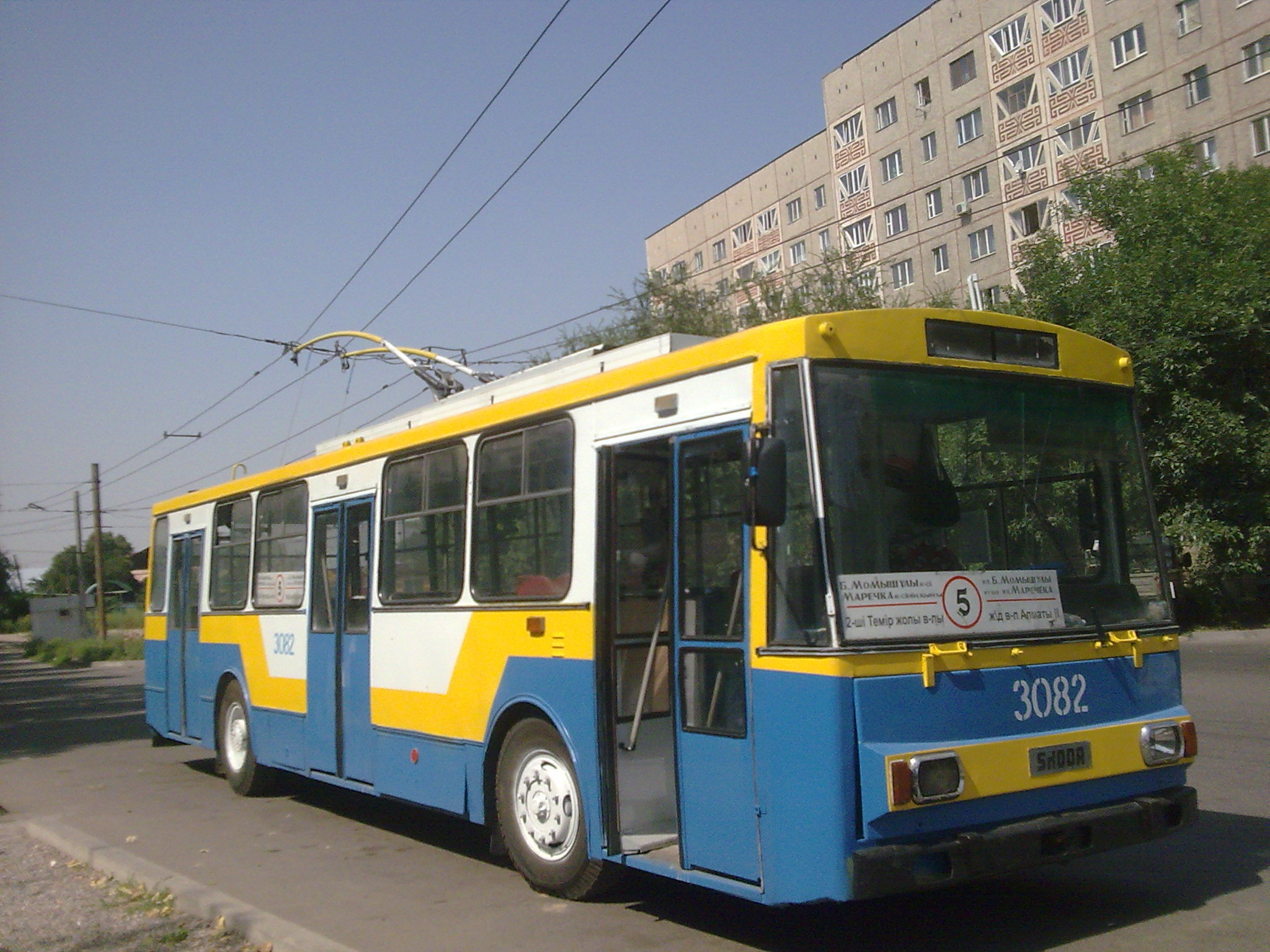 Алматинский троллейбус. Модель «Шкода-14Тр». Маршрут #5.